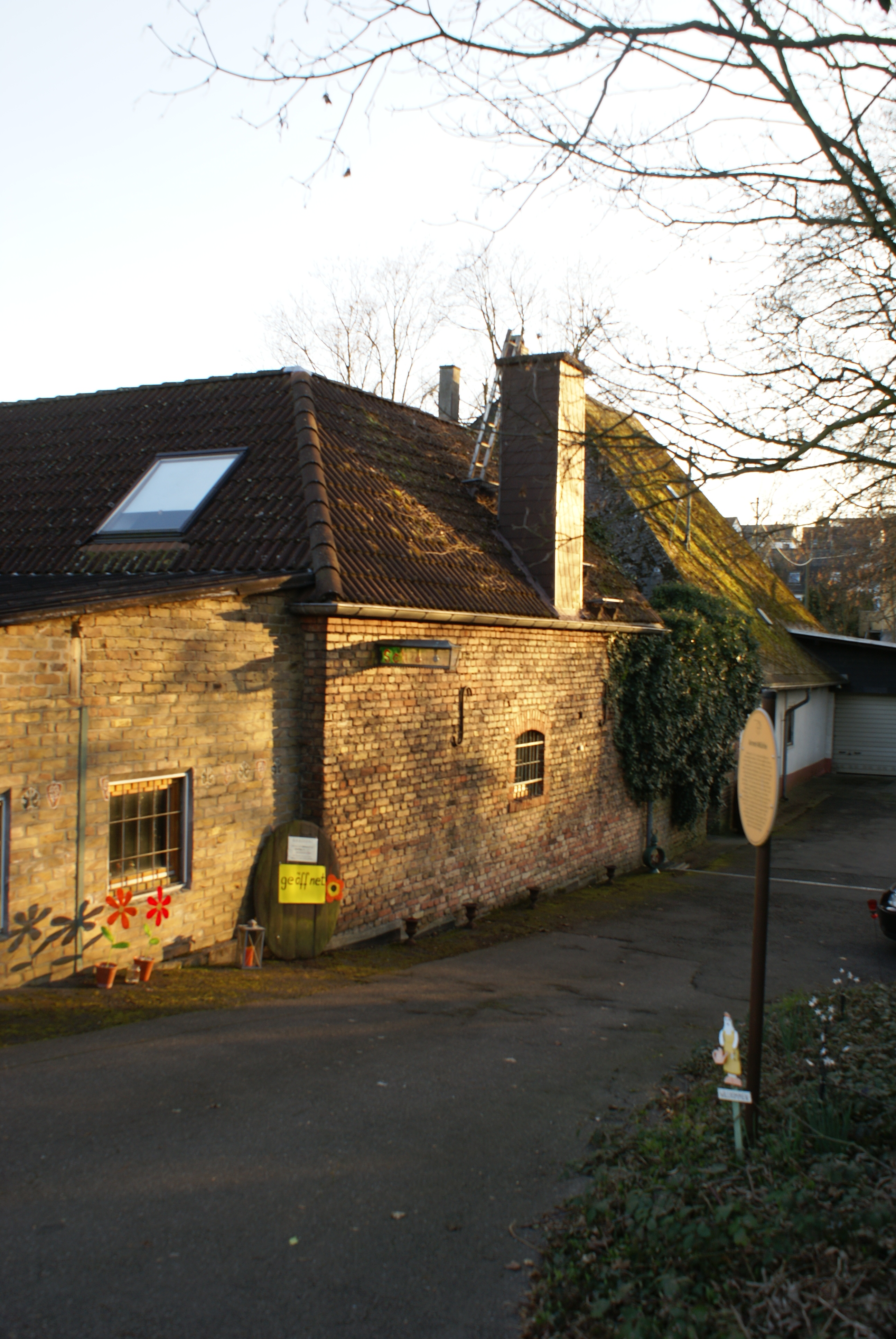 Arndt-Mühle in Oberwalluf